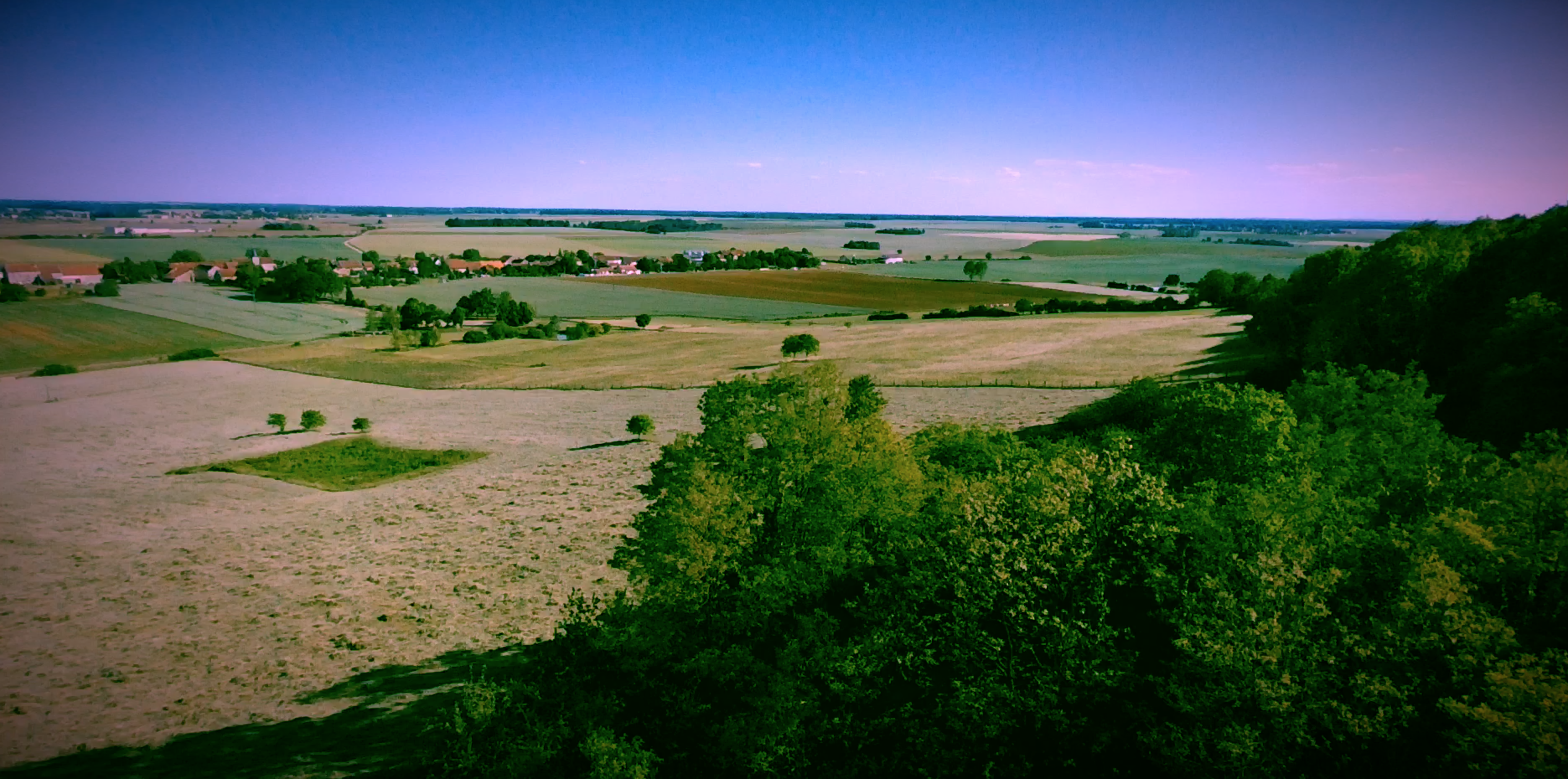 Vue depuis le Mont avec au premier plan une souce située à li hauteur du Mont.